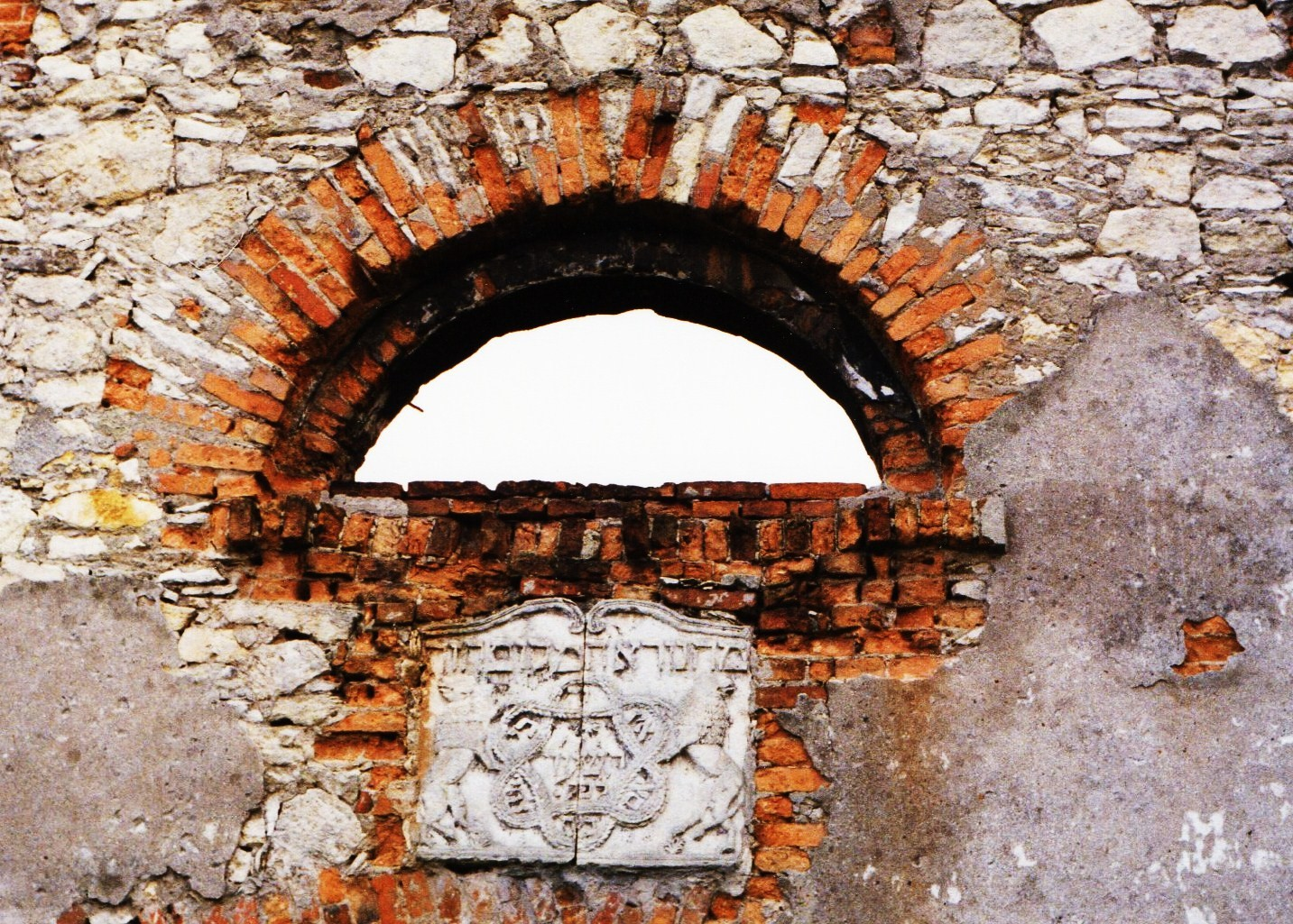 Synagoga w Krzepis=cach - 11.9.1993r.